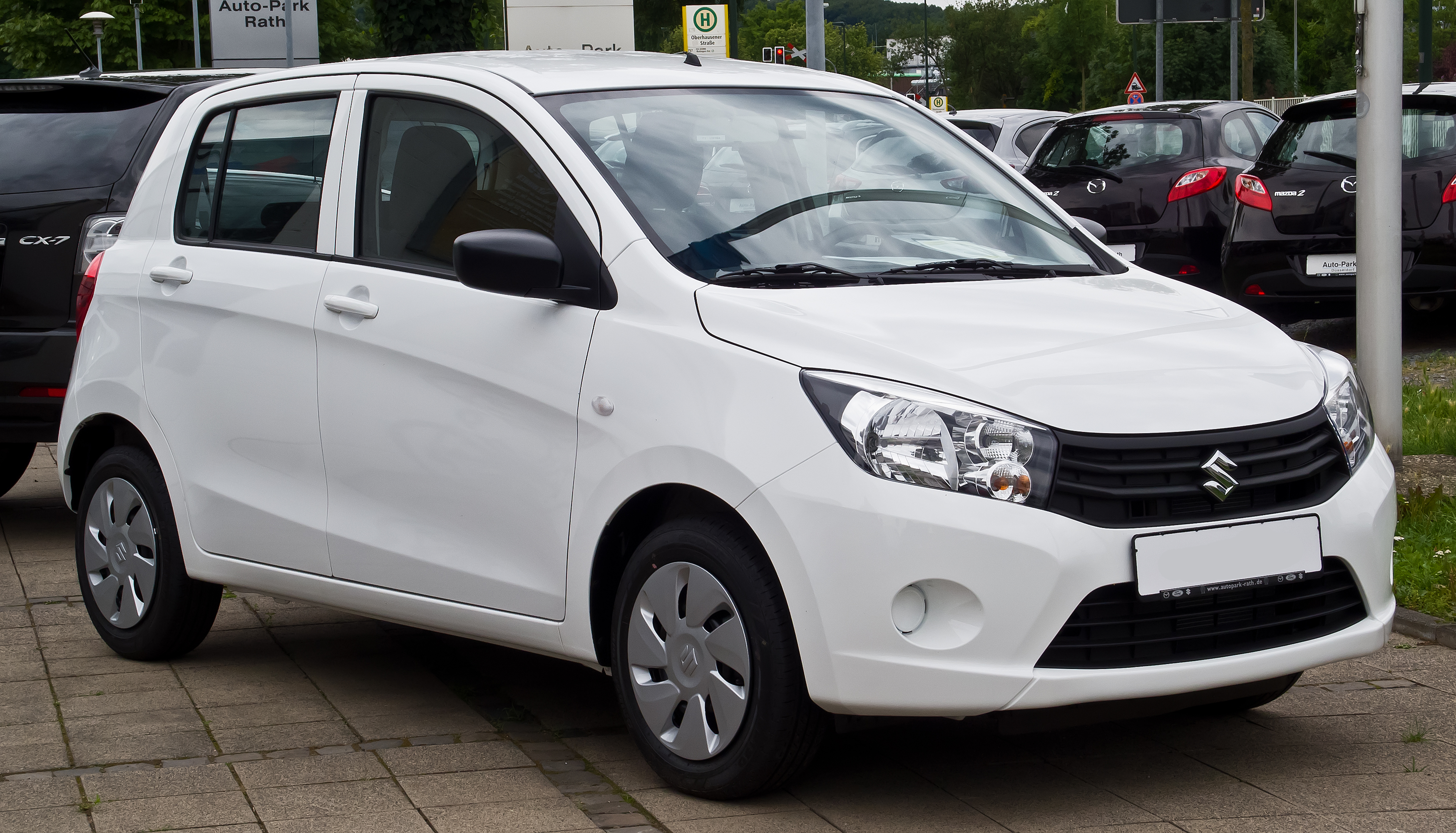 Suzuki Celerio 1.0 Club